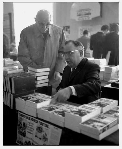 en dédicace